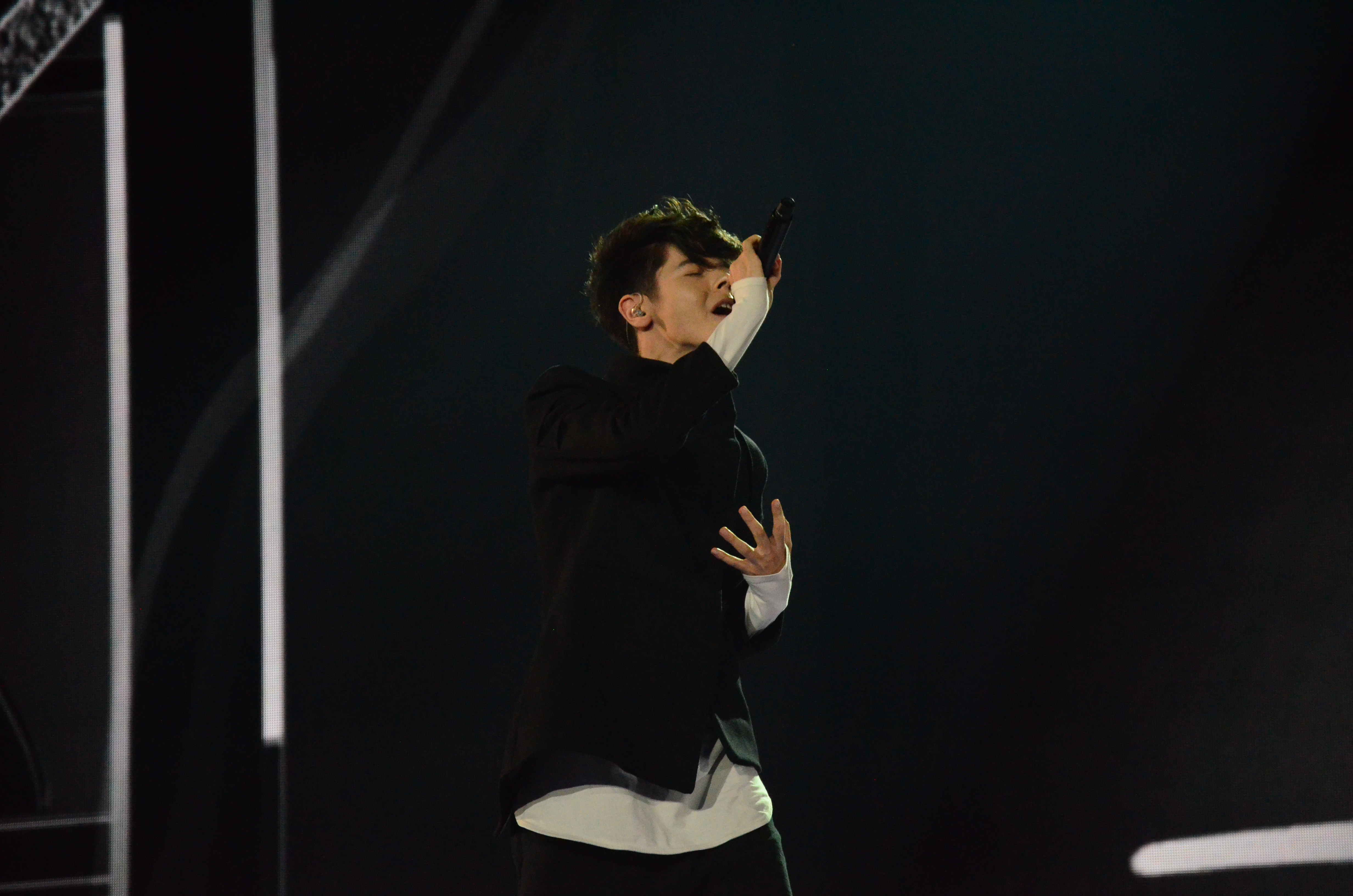 12 травня. Генеральна репетиція фіналу Євробачення 2017. Kristian Kostov (Bulgaria)